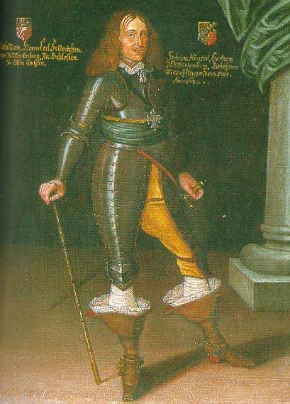 Silvius Nimrod, 1622-1664, First Duke of Württemberg-Oels